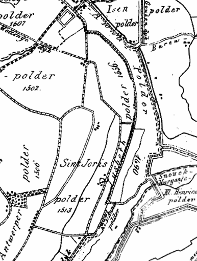 Sint Jorispolder